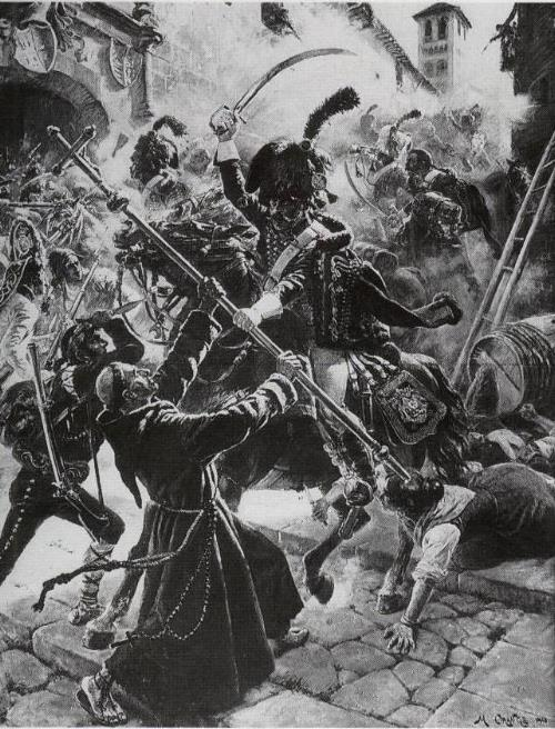 Le 2 mai 1808, pour mater la révolte du peuple madrilène, le maréchal Murat, gouverneur de Madrid, envoie la cavalerie en ville afin de ramener l'ordre. Les chasseurs à cheval de la Garde impériale du général Daumesnil participent à la répression. On voit ici le combat entre les chasseurs et des insurgés dans la rue d'Alcala, théâtre de violents affrontements entre la cavalerie de la Garde (et notamment les mamelouks) et les Madrilènes. Sur cette peinture sont présentes les caractéristiques de la guerre urbaine : à l'opposé des grands sabres recourbés des chasseurs, les Espagnols (dont font partie des femmes) luttent avec des couteaux et des fusils archaïques. Tandis que la populace combat à pied, les Français, sabrant sans état d'âme, sont juchés sur de grands chevaux, dans leurs uniformes rutilants d'or (on retrouve ces mêmes caractéristiques dans Dos de Mayo de Goya). La présence du moine montre le rôle proéminent que joua la religion dans la propagation du sentiment antifrançais. Après avoir forcé le passage, les cavaliers de Murat déboucheront sur la Puerta del Sol où ils disperseront les manifestants.